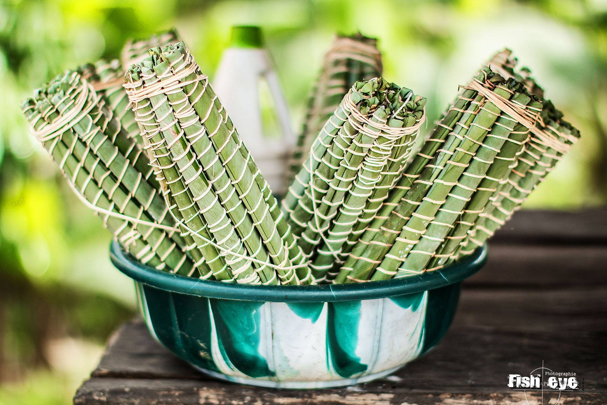 Cette image montre une cuvette rempli avec les Miondo du Cameroun. Le littoral, région renfermant de multiples spécialités culinaires, nous dévoile la recette d’un de ses bijoux. Le manioc étant à la base de l’alimentation de nombreuses familles africaines, c’est le composant principal du produit dont il est présentement question (le Miondo). C'est une ouvre d'art qui d'une façon ou une autre montre la particularité de la richesse culturelle du Cameroun. This is an image from Cameroon